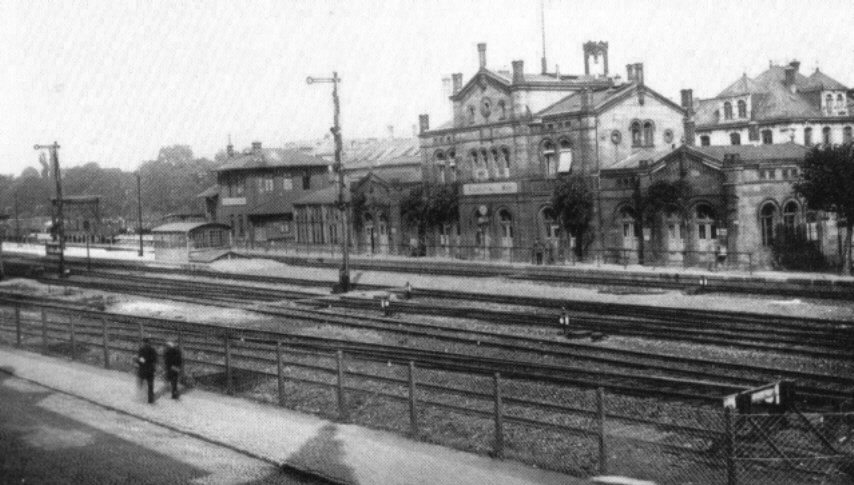 Frankfurt-Bockenheim, Bahnhof Frankfurt/Main-West. Der Bahnhof wurde 1848 als Bahnhof Bockenheim an der Strecke der Main-Weser-Bahn (Frankfurt–Kassel) errichtet. Er wurde nach einem Entwurf von Julius Eugen Ruhl mit einem relativ aufwändigen Empfangsgebäude im Stil der Neorenaissance, einschließlich eines besonderen Aufenthaltsbereichs für den Kurfürsten, ausgestattet. Der Personen- und Güterbahnhof war die entscheidende Infrastrukturmaßnahme für die Industralisierung des kurhessischen Bockenheims. Von hier ging ein Nebengleis in das Industriequartier Somlsstraße, ein anderes führte über die Nassauer Straße (spätere Adalbertstraße) bis zur Bockenheimer Warte. Das Gebäude wurde 1944 durch Bombentreffer zerstört und wurde als reiner Zweckbau verändert neu errichtet.